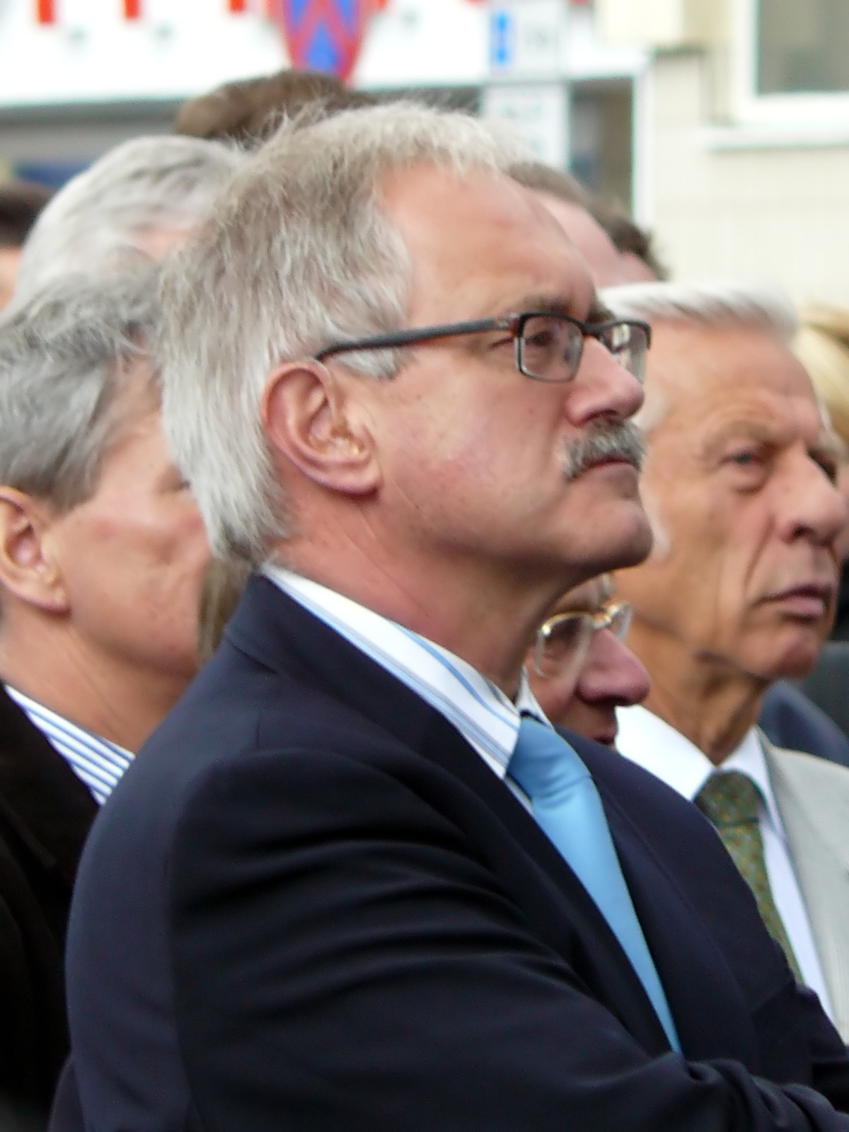 Günter Gloser, MdB (SPD) bei der Eröffnung der U3 an der Gustav-Adolf-Straße